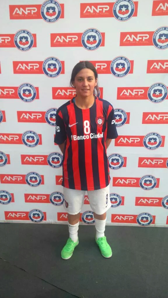 Eliana Medina, figura del primer partido de San Lorenzo en la fase de grupos de la Copa Libertadores de Futsal Femenino 2015.